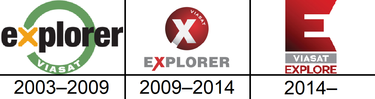 A csatorna logói 2003-tól napjainkig